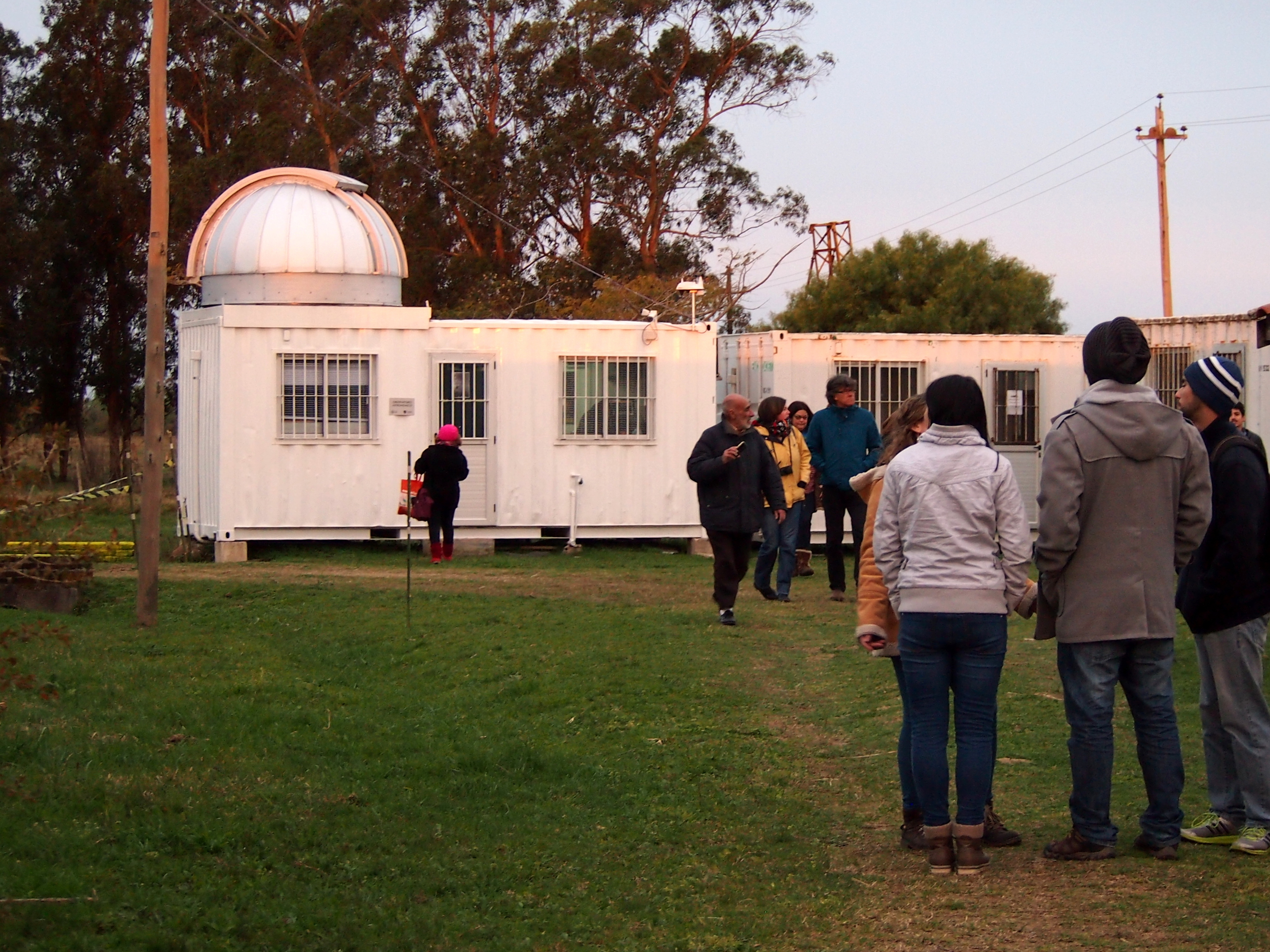 Cúpula del telescopio del Observatorio Astronómico del CURE el día de su inauguración